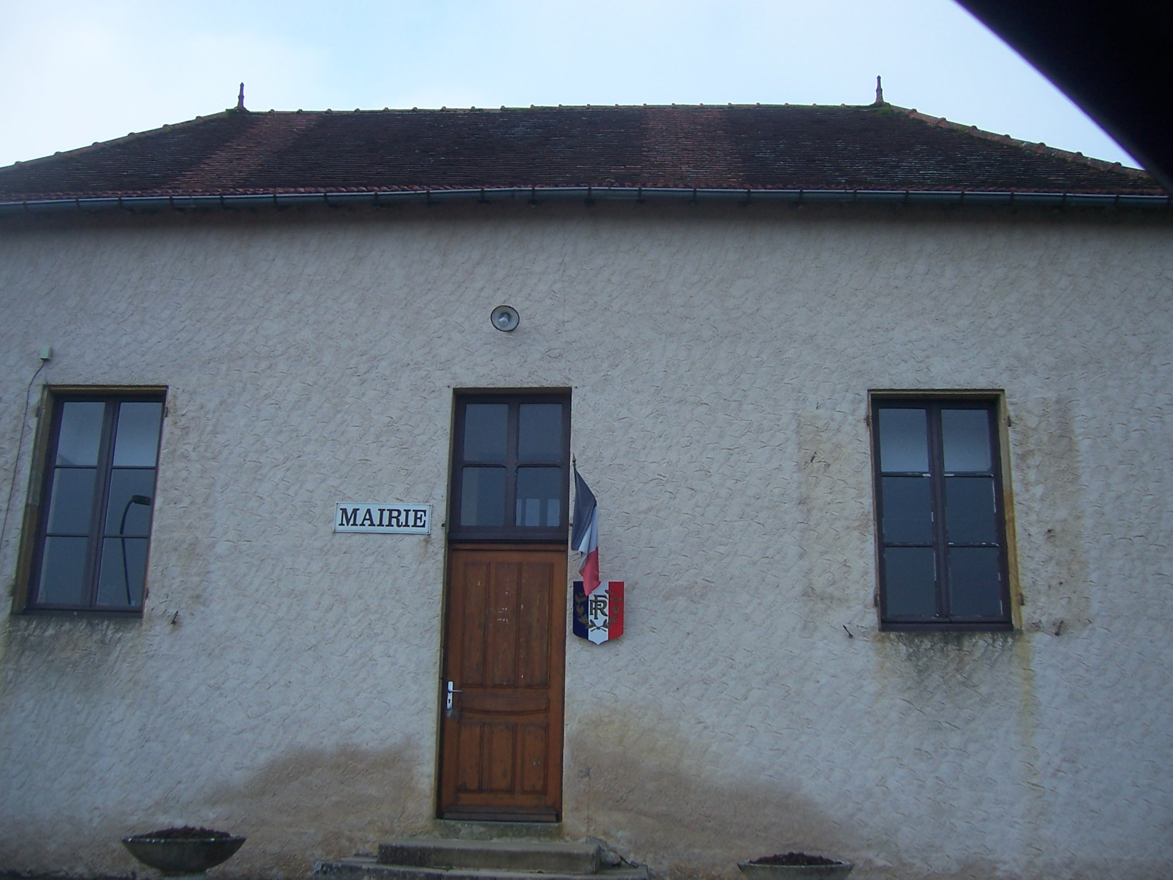 Mairie de Sainte-Foy